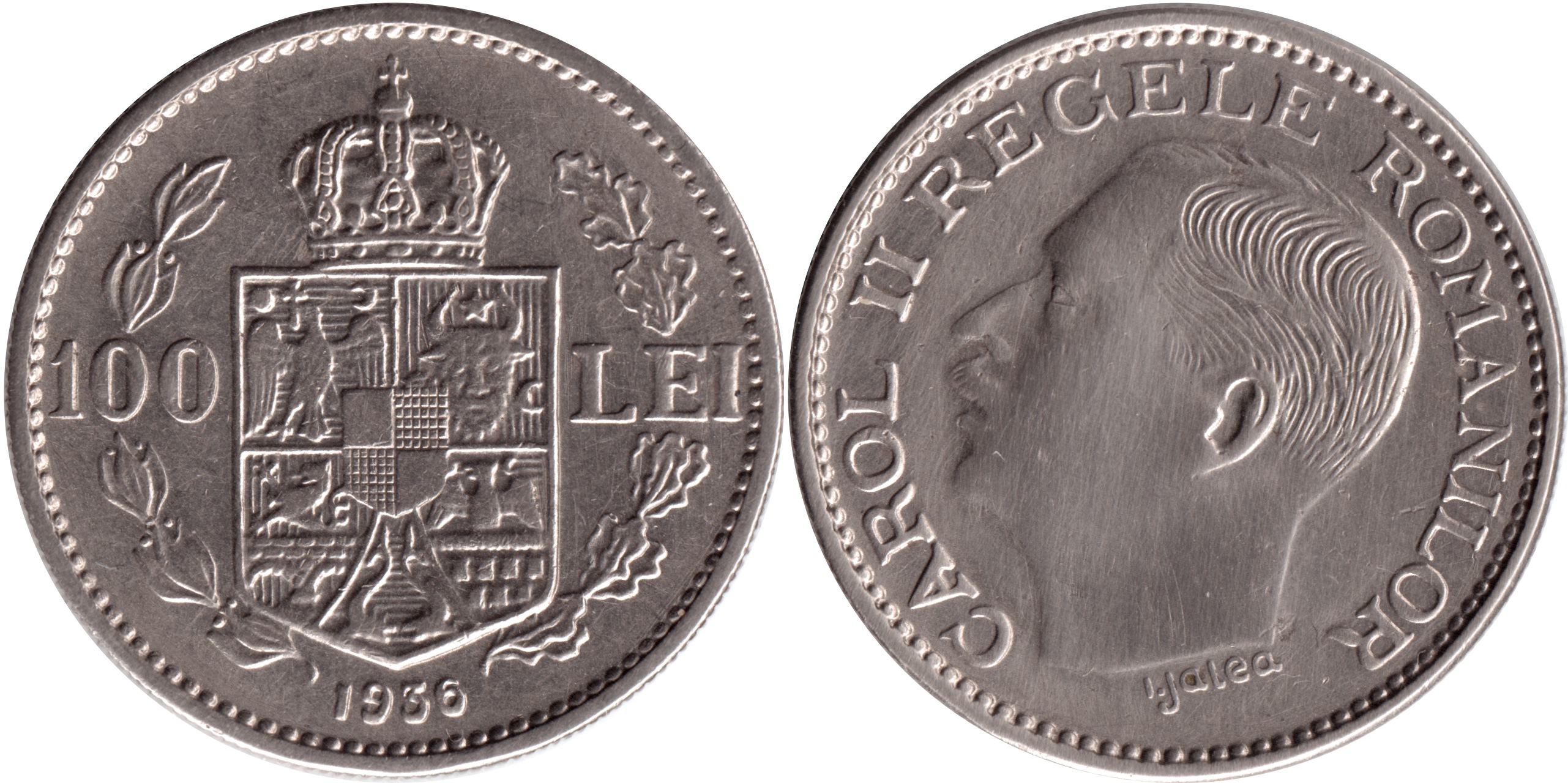 Romanian coin: 100 lei 1936